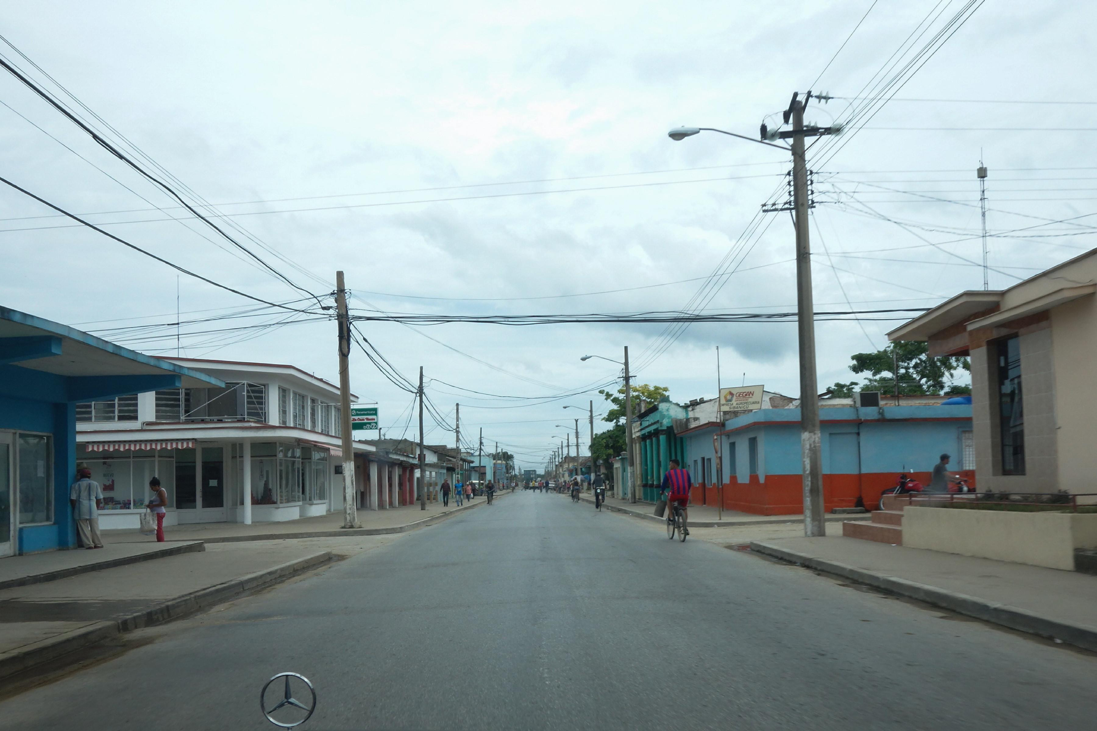 Sibanicú, Cuba